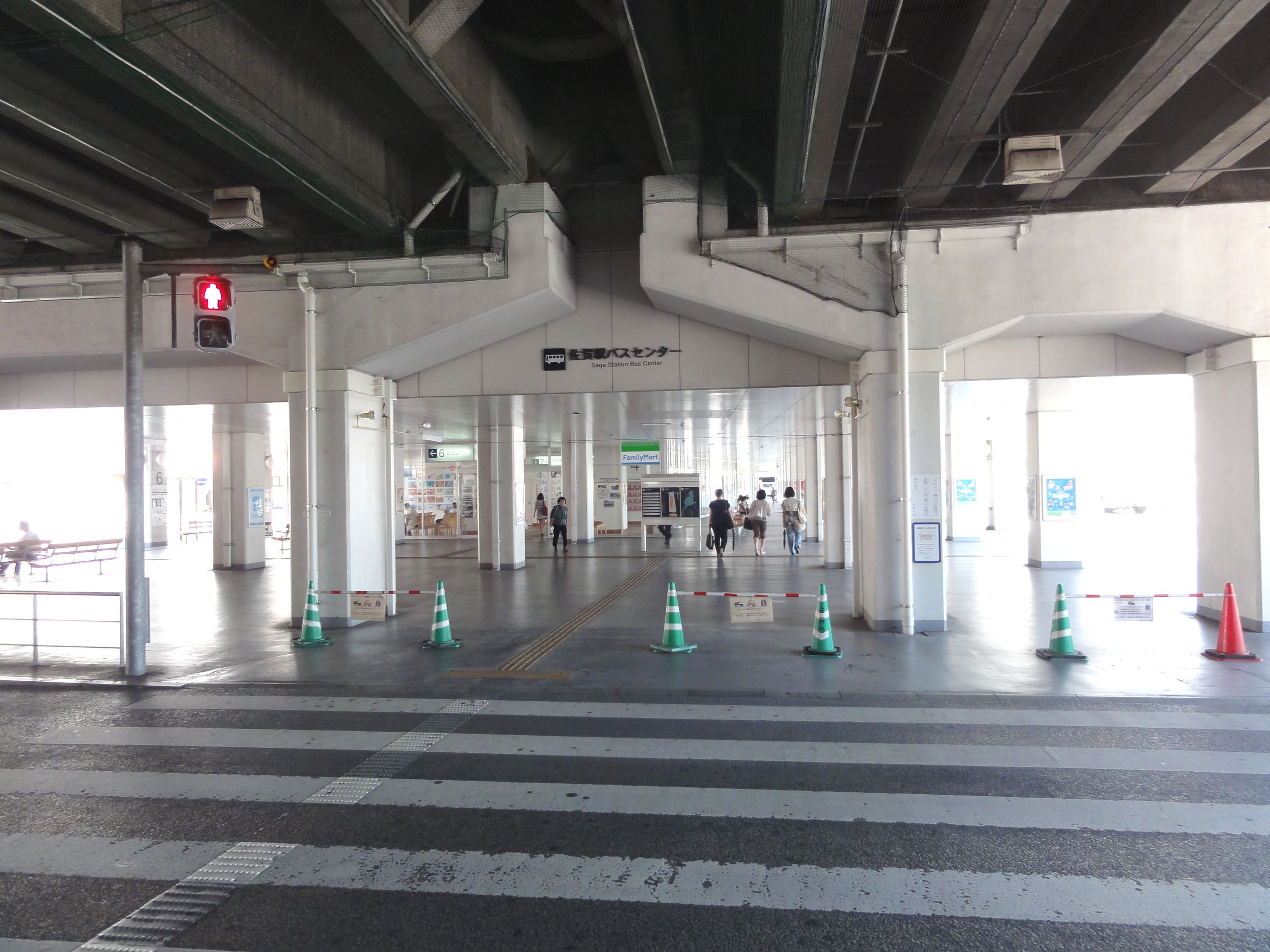 佐賀駅バスセンター